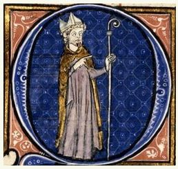 Eudes Rigaud (vers 1210-1275), membre de l'ordre franciscain et archevêque de Rouen (1248-1275).